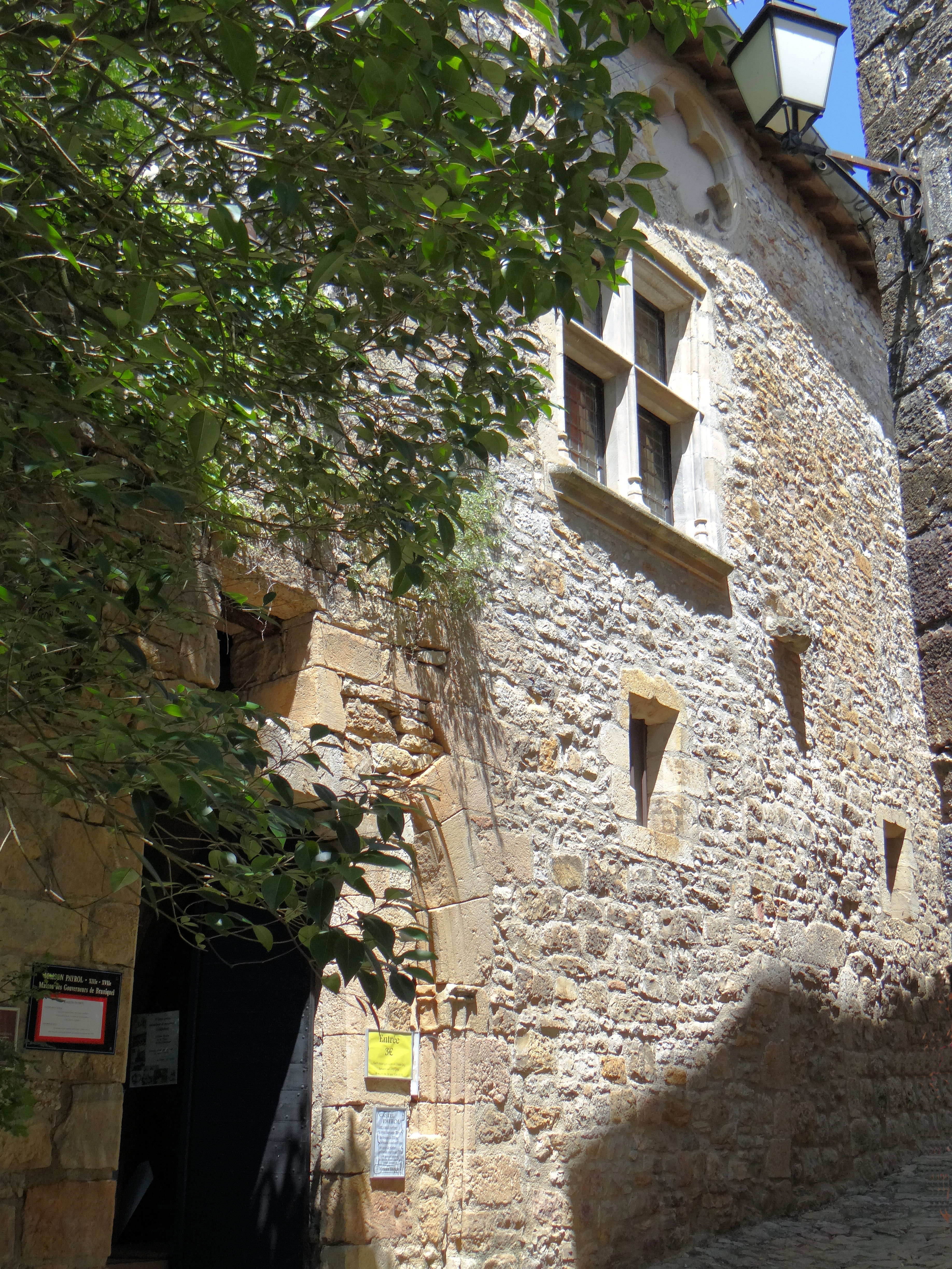 Bruniquel - Maison Payrol